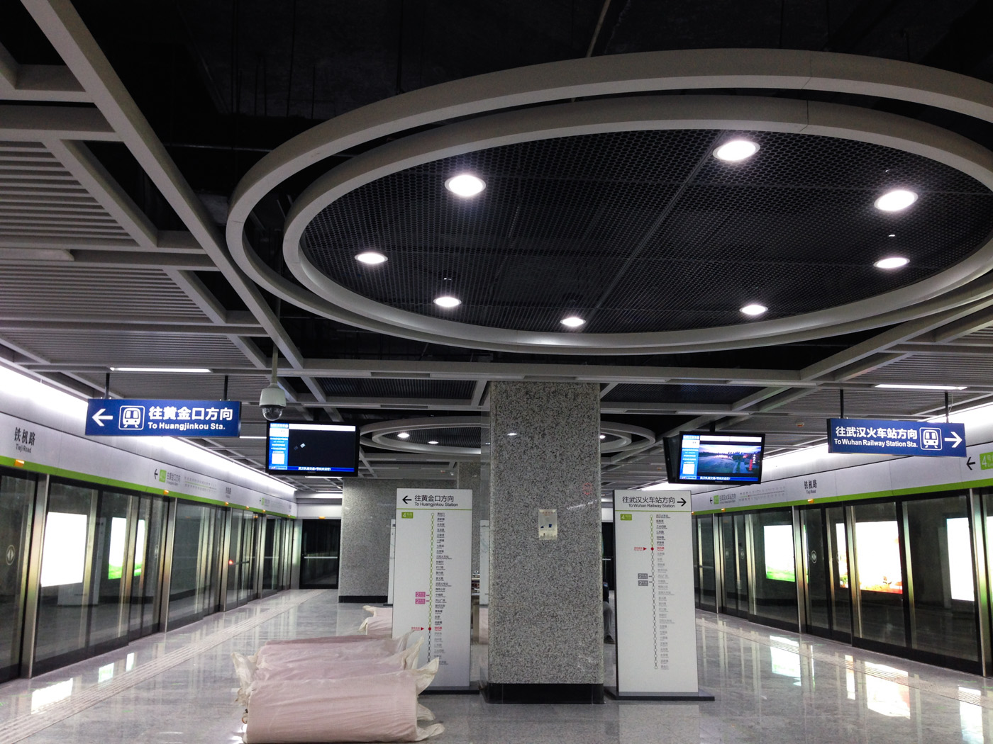 中文（中国大陆）: 武汉地铁4号线铁机路站“天圆地方”装修主题